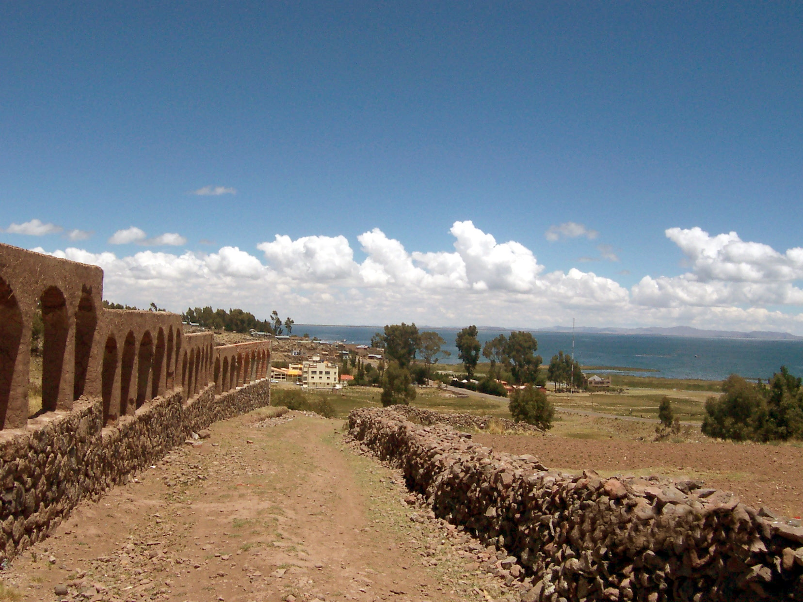 Lago Titicaca desde la colina de Chucuito